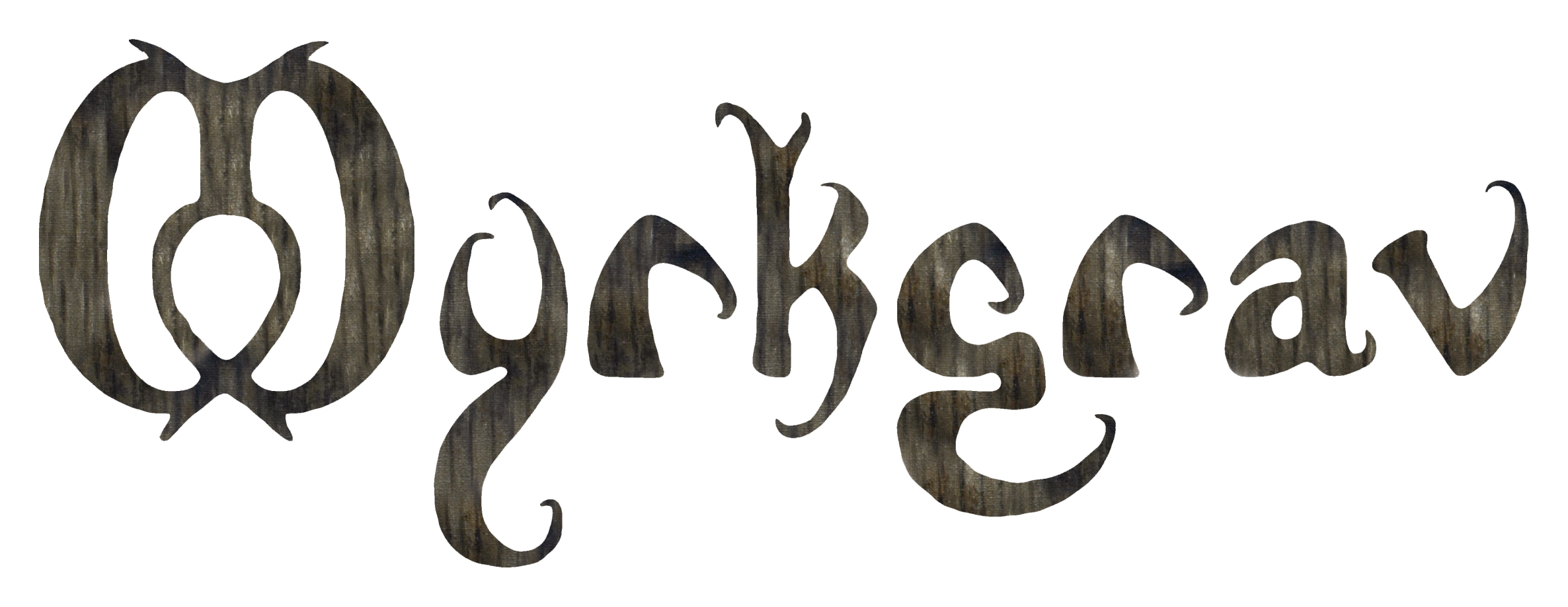 Myrkgrav band-logo